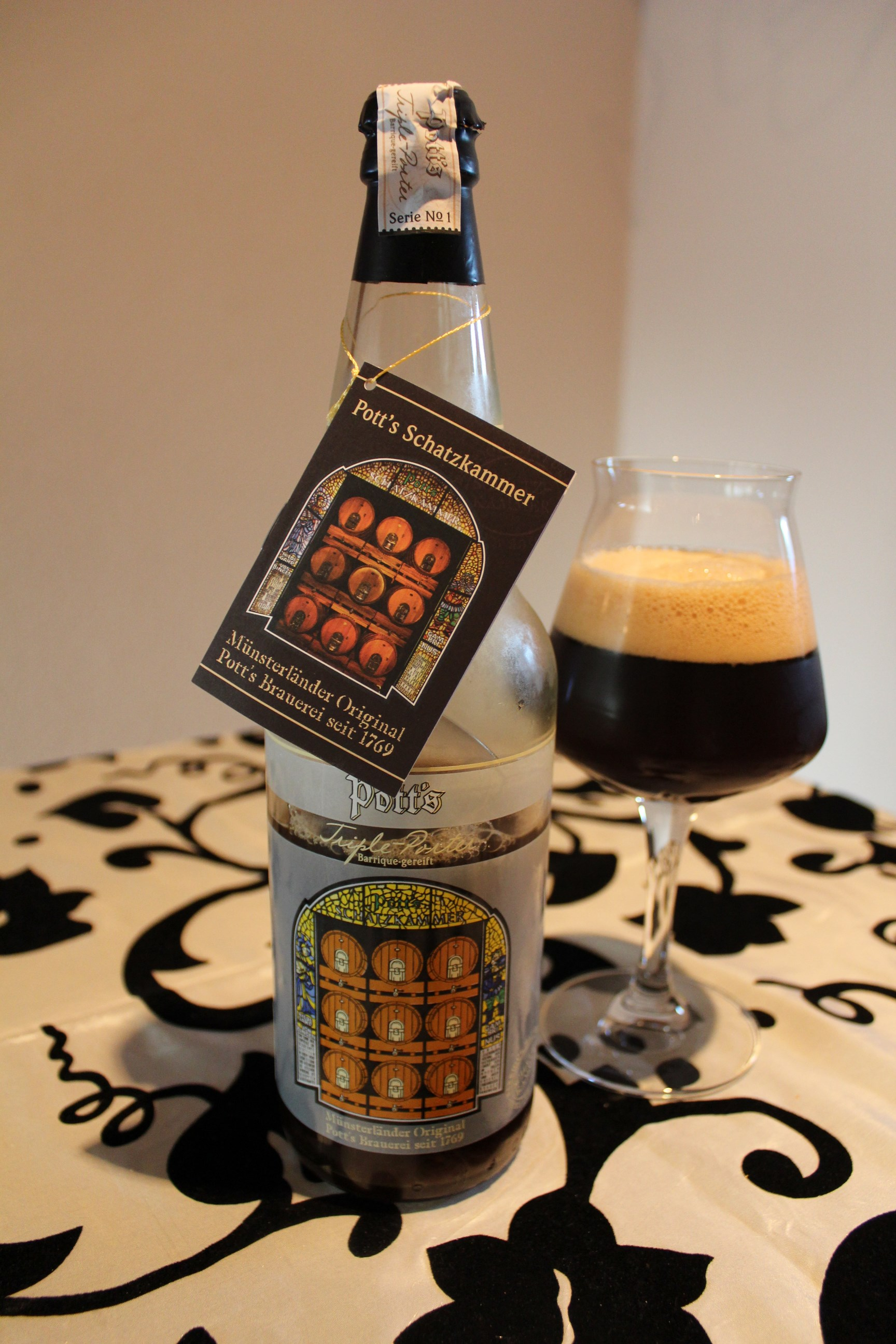 Pott's Tripel Porter